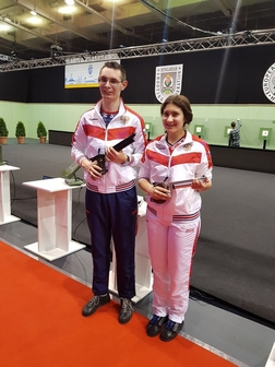 Антон Аристархов (слева) и Яна Енина (справа) на Чемпионате Европы по стрельбе. г.Дьёр, Венгрия.